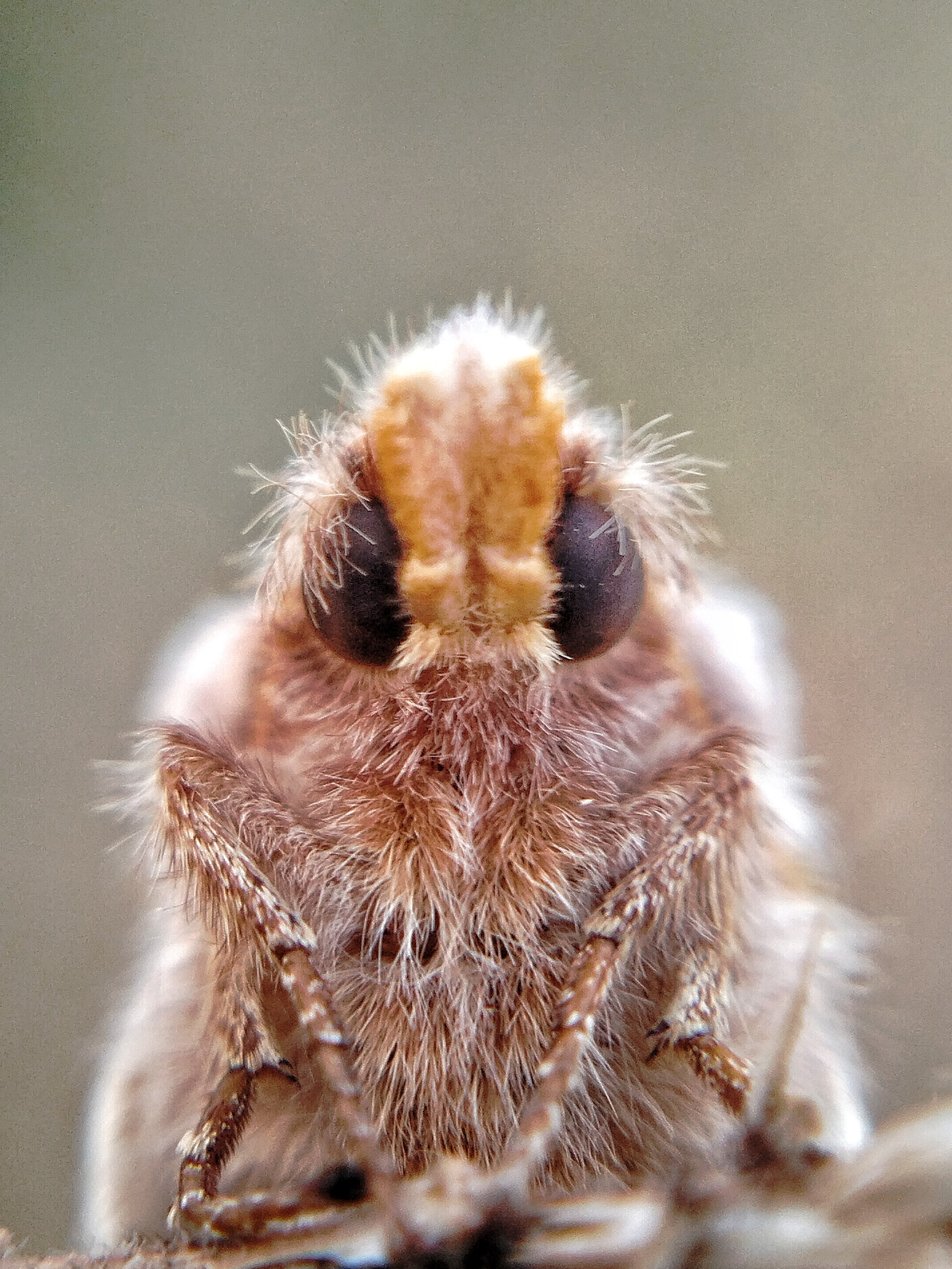 Euthrix potatoria (Philudoria potatoria), m., Grasglucke, Männchen, NSG Kirchwerder Wiesen, Elbmarsch bei Hamburg, Germany